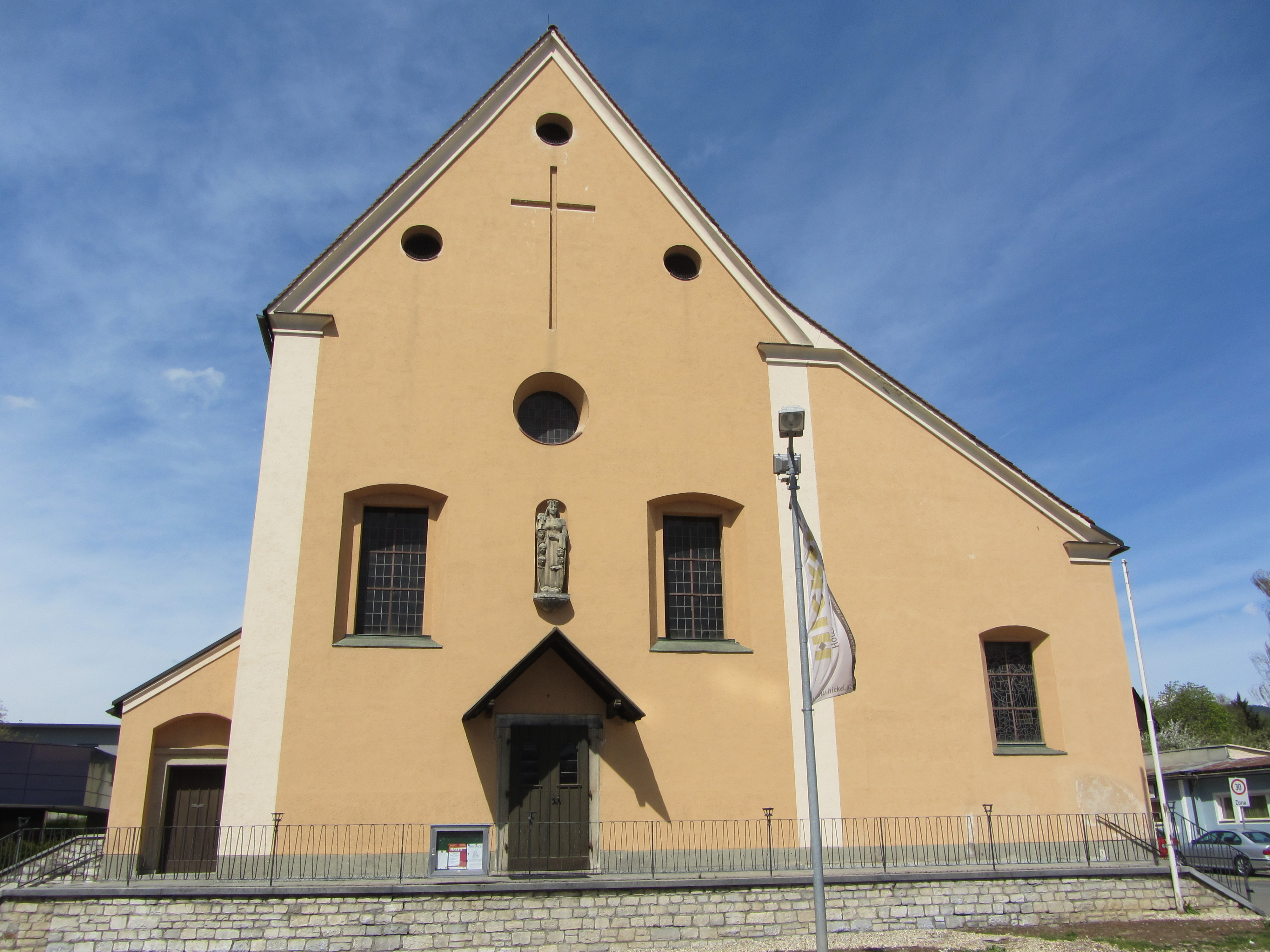 Kapuzinerkirche Maria Verkündigung